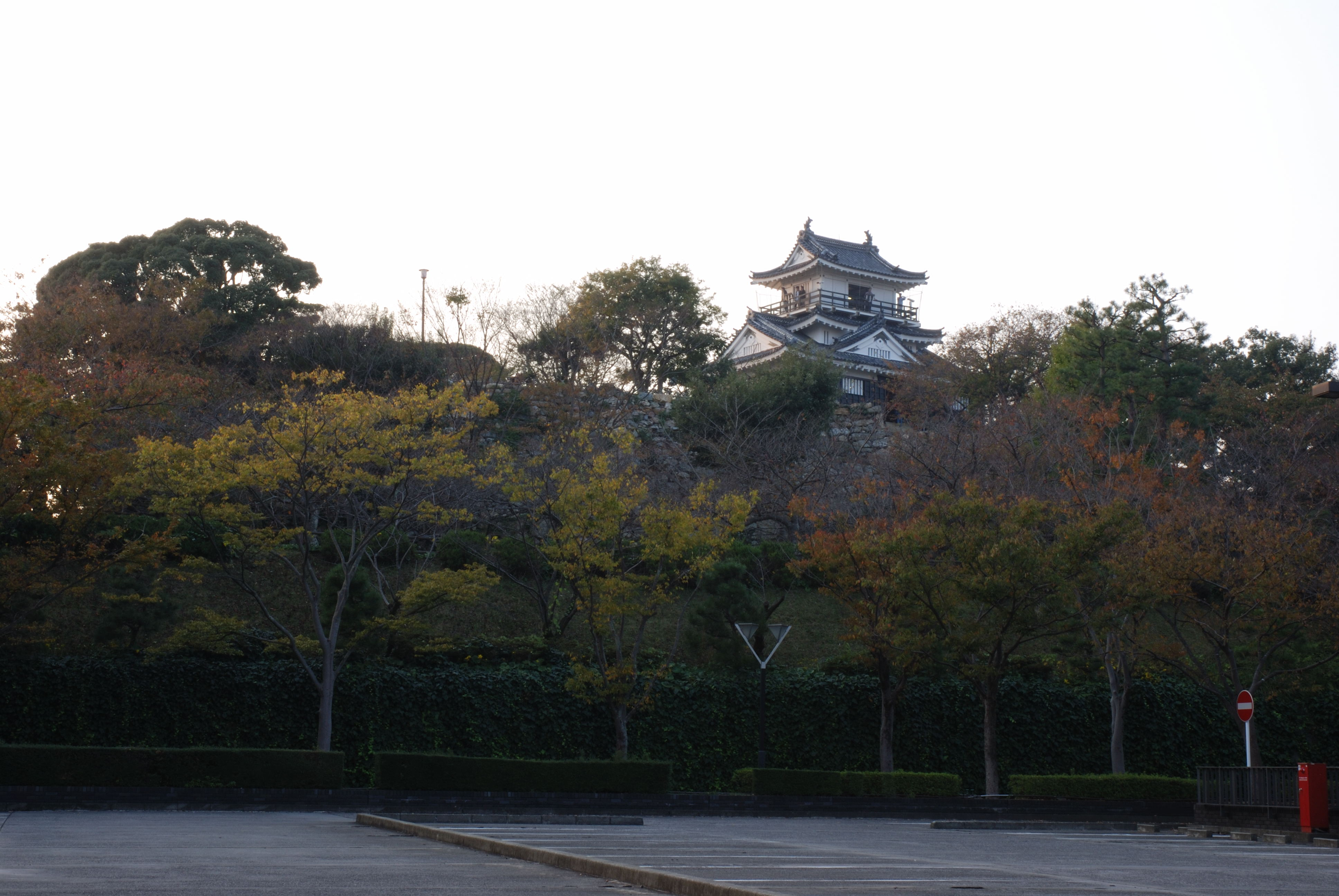 Hamamatsu Castle